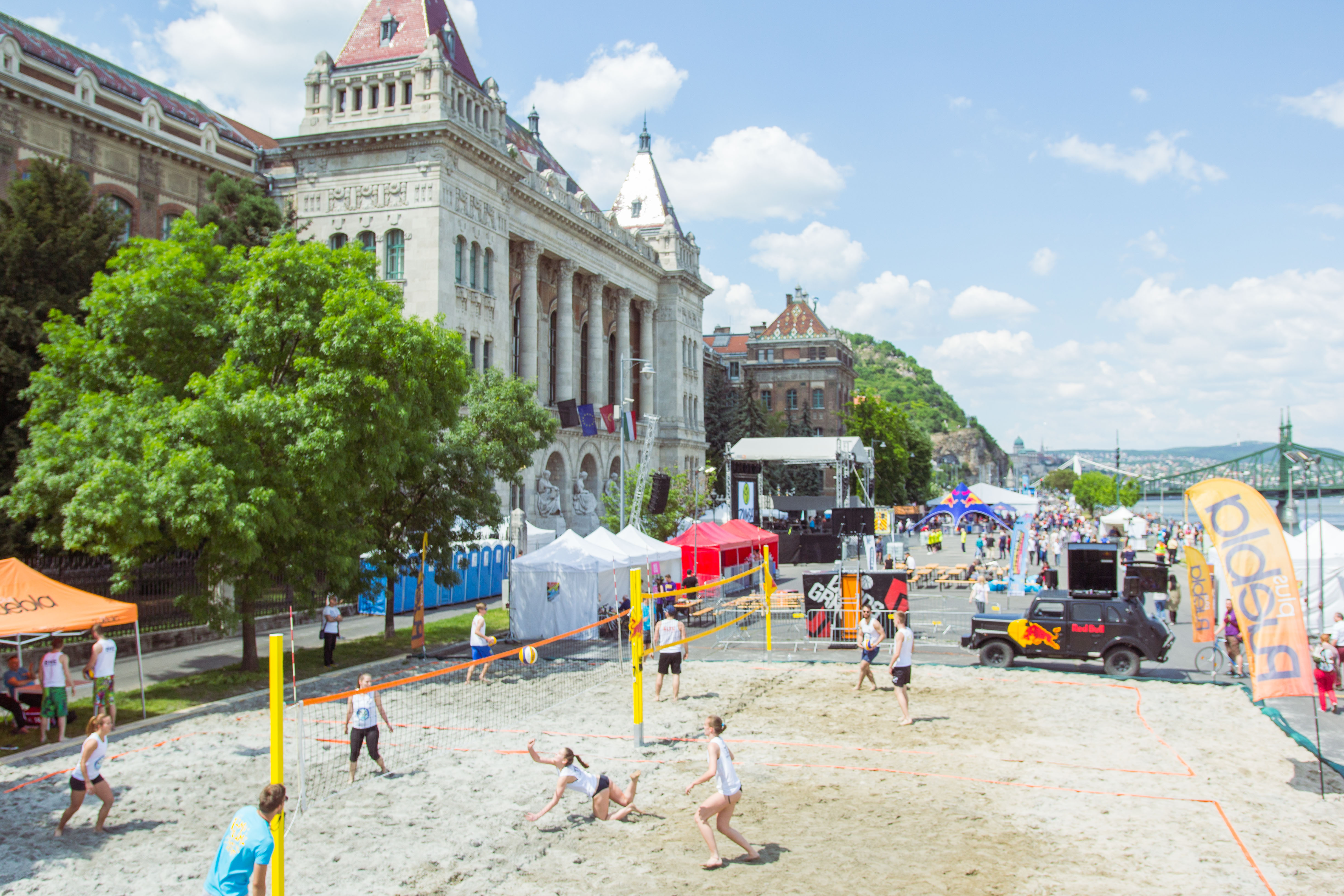 Dunai Regatta 2016 - rakparti sportbajnokságok (fotó: Biró Dávid)